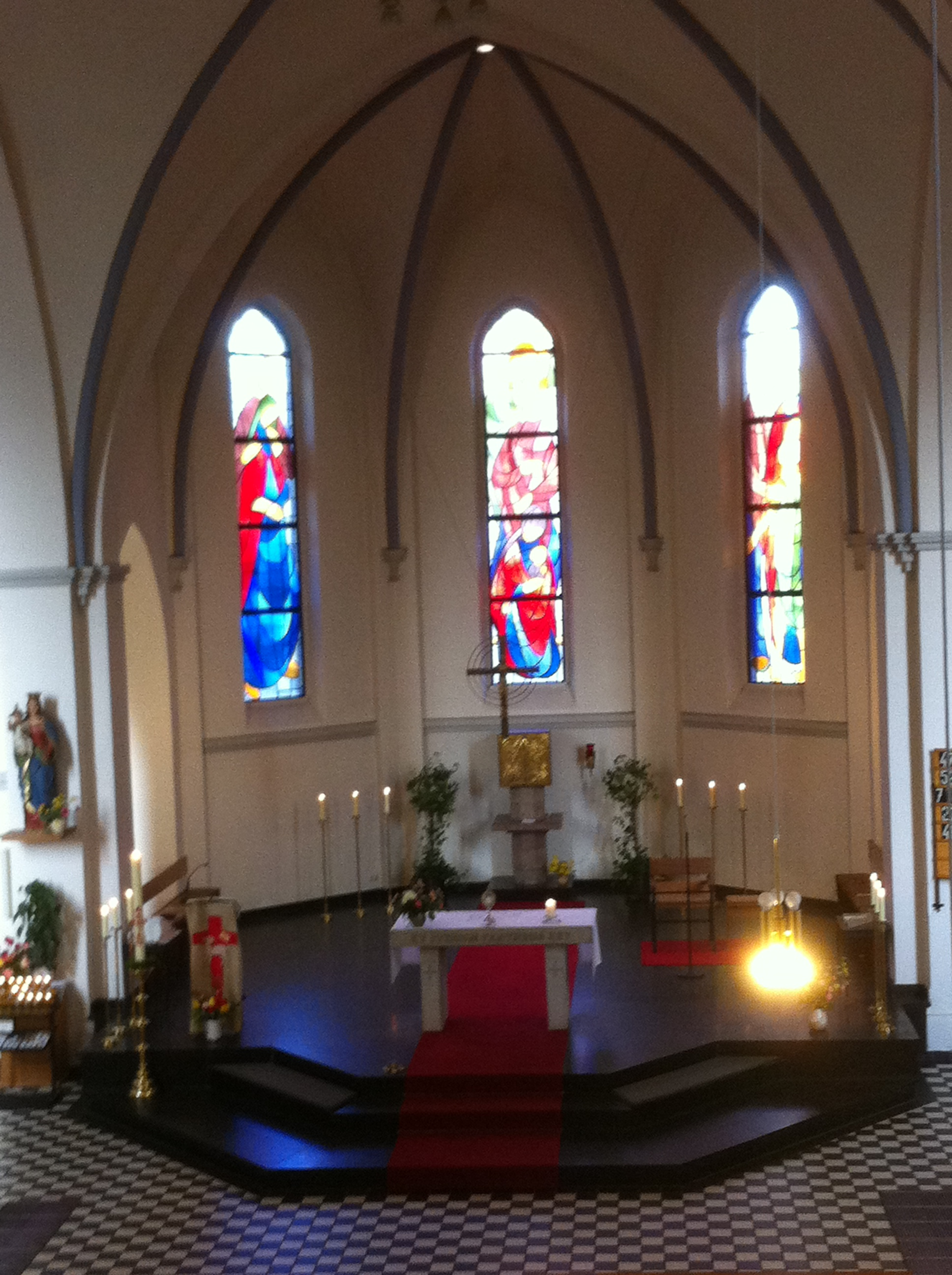 Chor und Apsis der römisch katholischen Kirche St. Joseph in Greifswald.